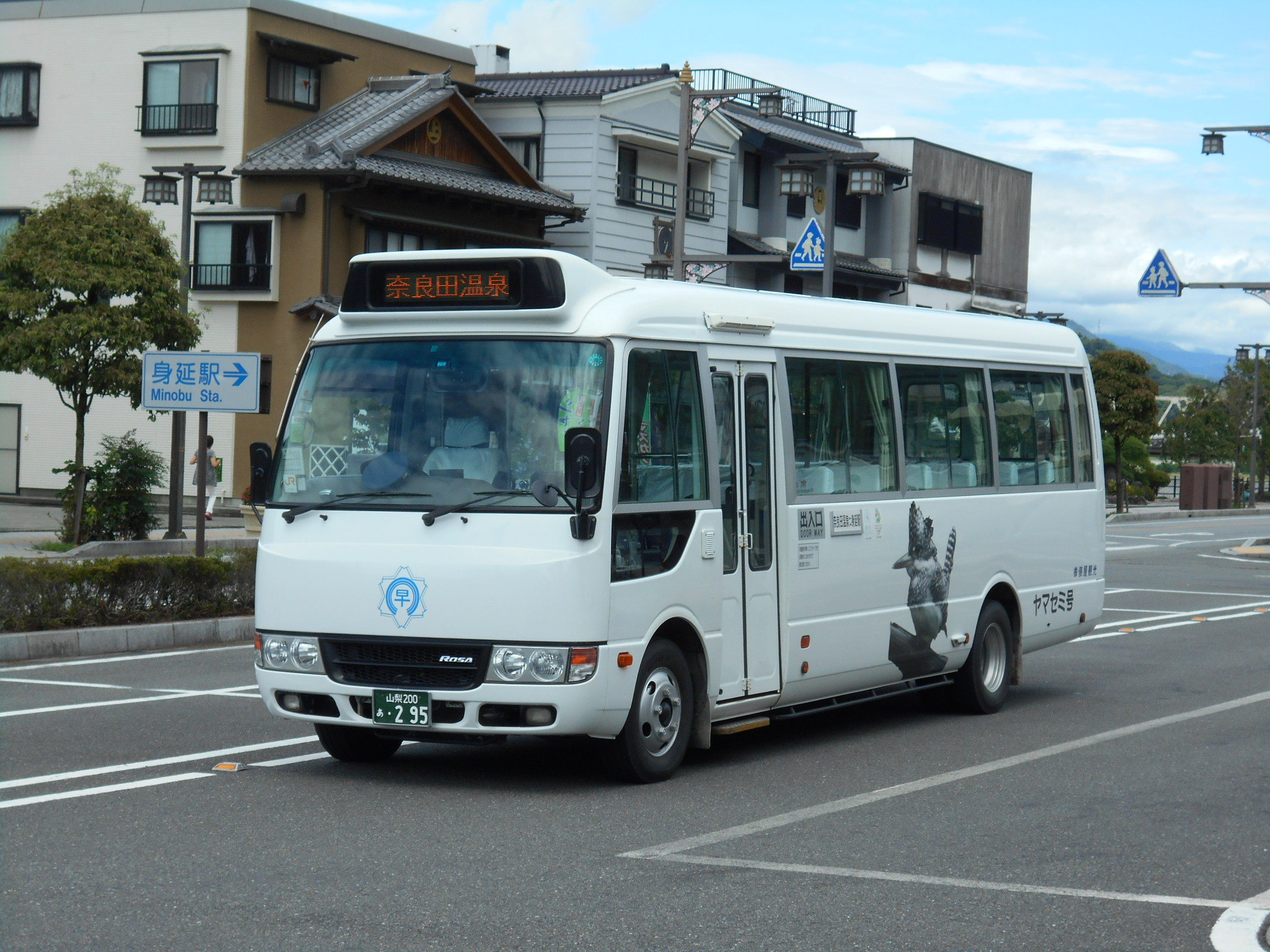 見延駅前にて停車中の早川町乗合バス